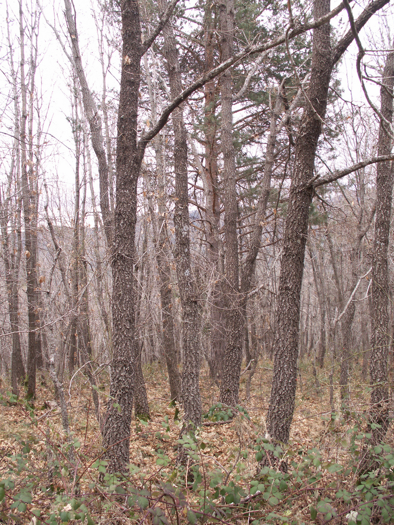 Rebollar en invierno